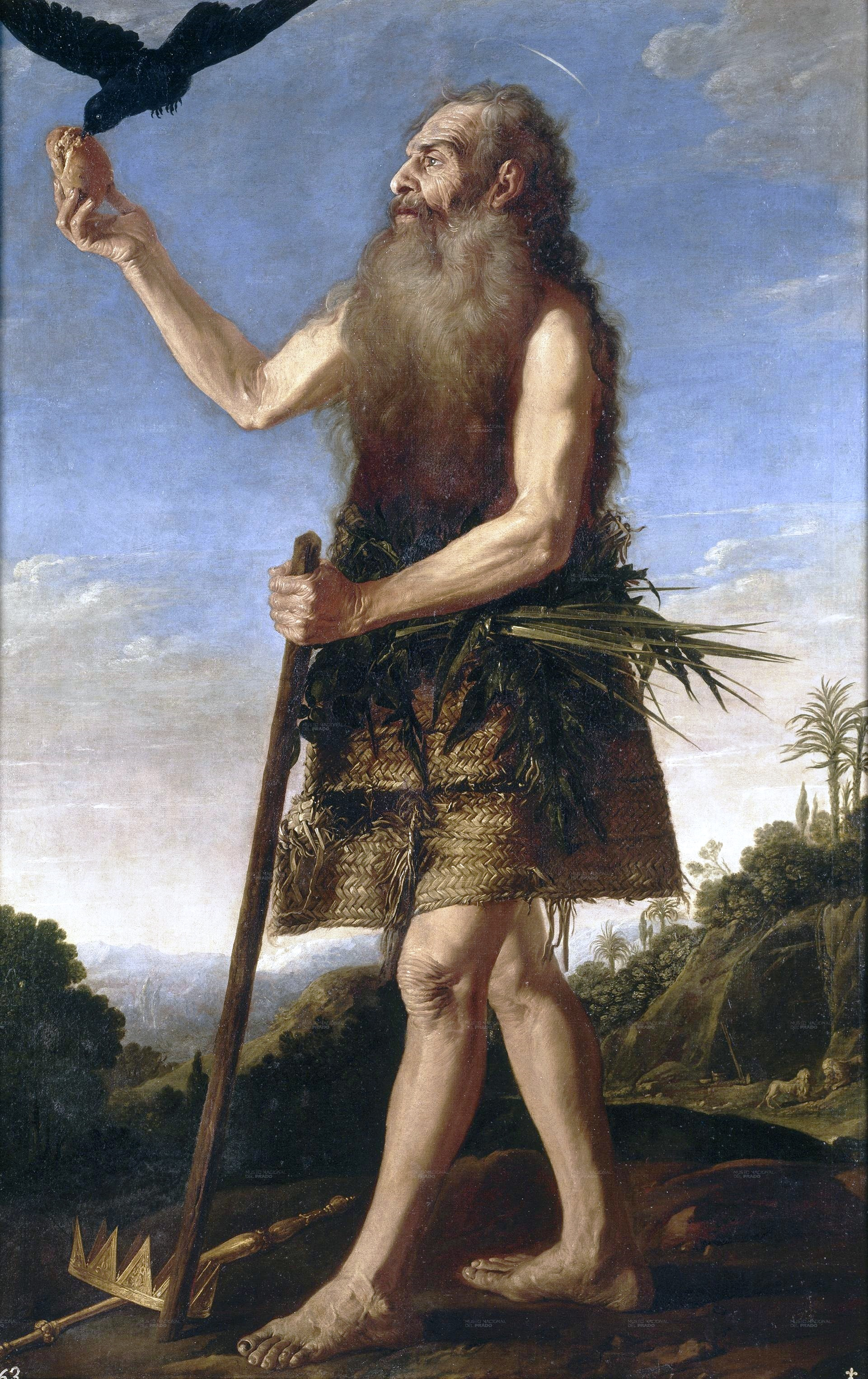 La obra representa al eremita cristiano San Onofre.